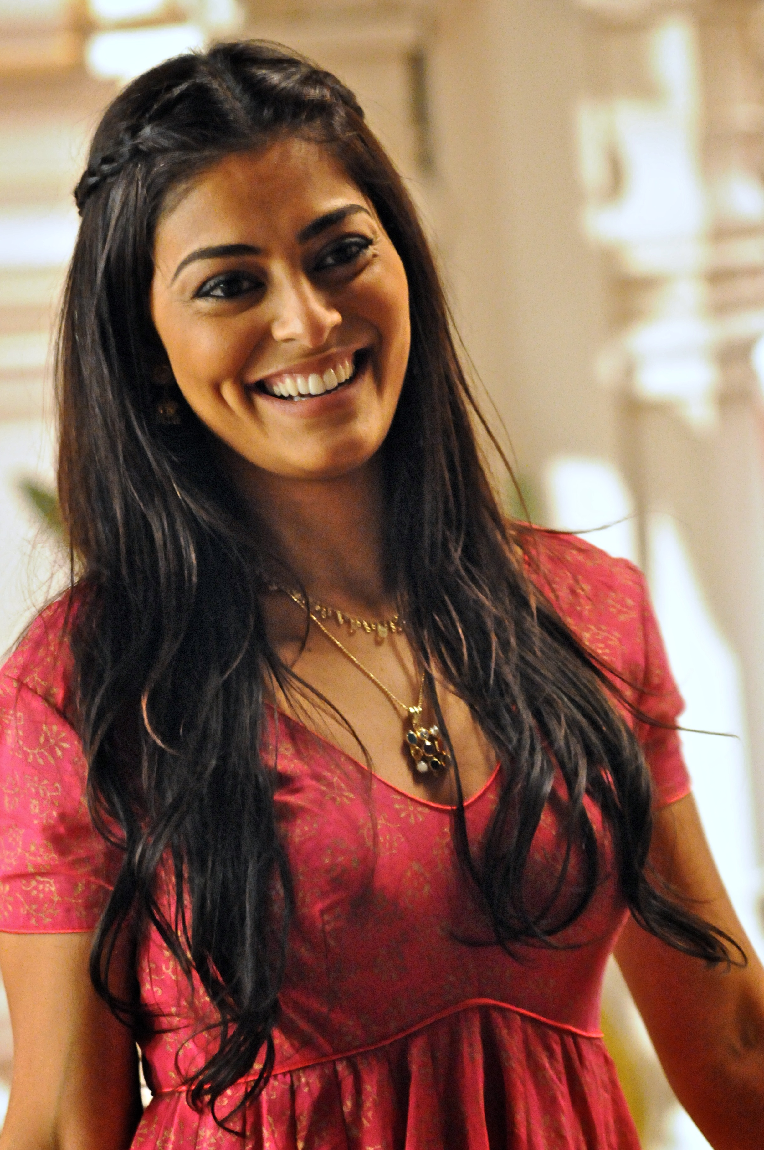 Juliana Paes no "Café com Glória", um bate-papo com Glória Perez sobre a nova novela das 8h, Caminho das Índias.